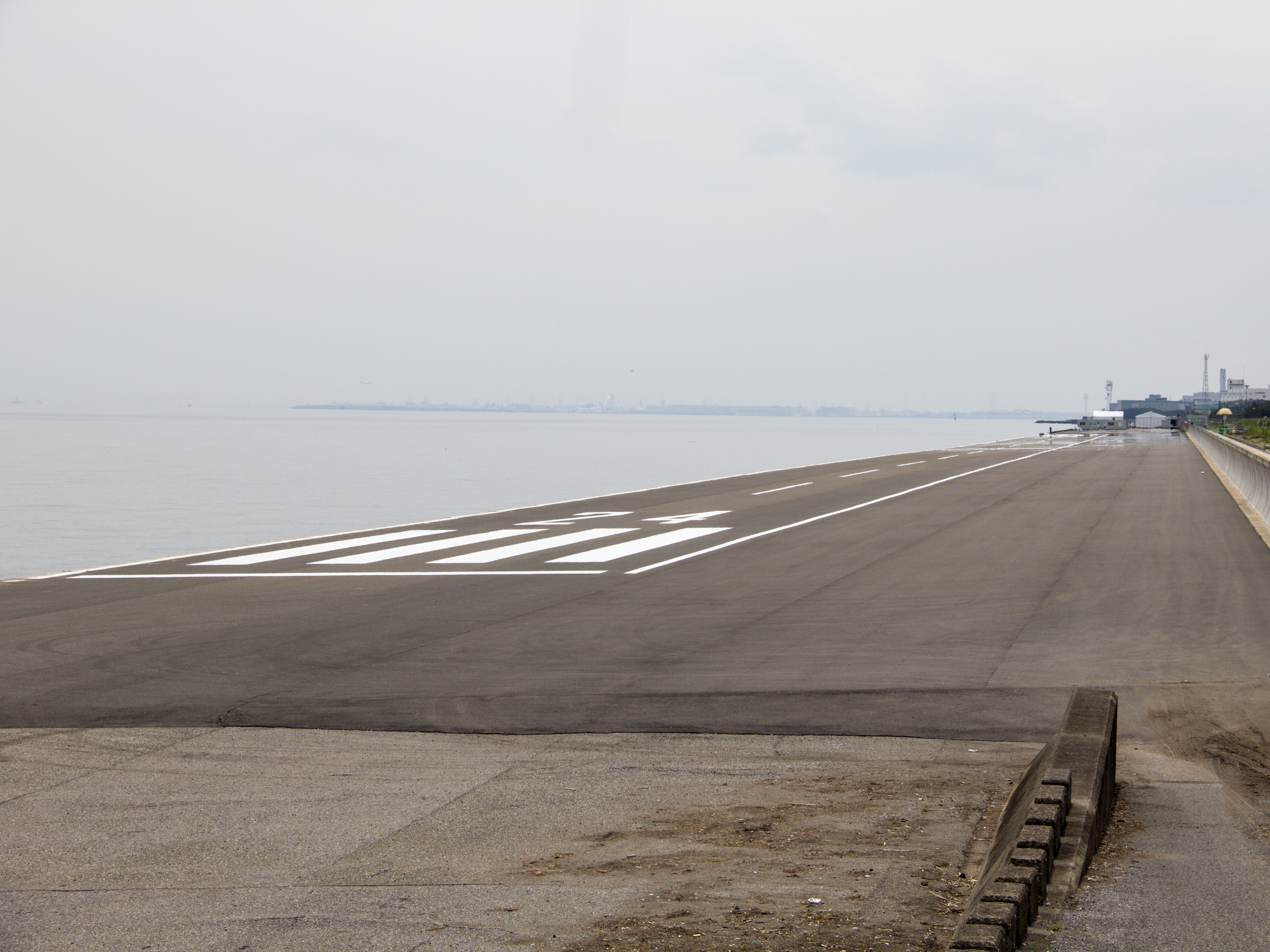 浦安市臨時滑走路